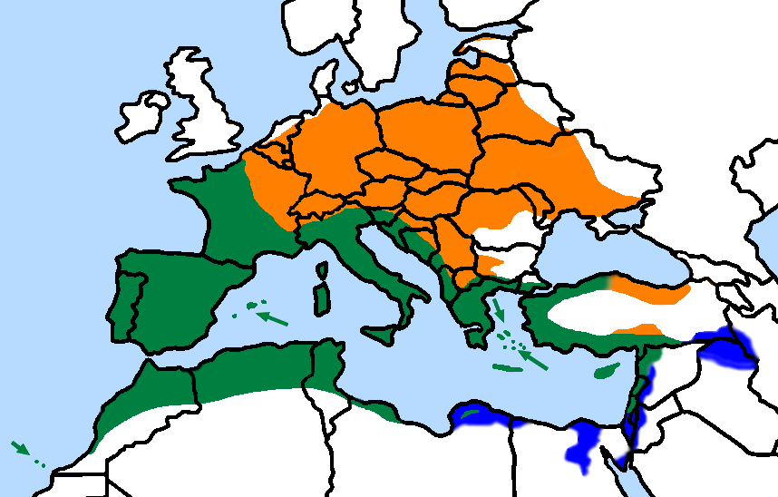 Serinus serinus MAIN SOURCE: Beaman/Madge: Handbuch der Vogelbestimmung. ULMER 1998; S 770. AUTHOR: Ulrich Prokop (Scops) self build.